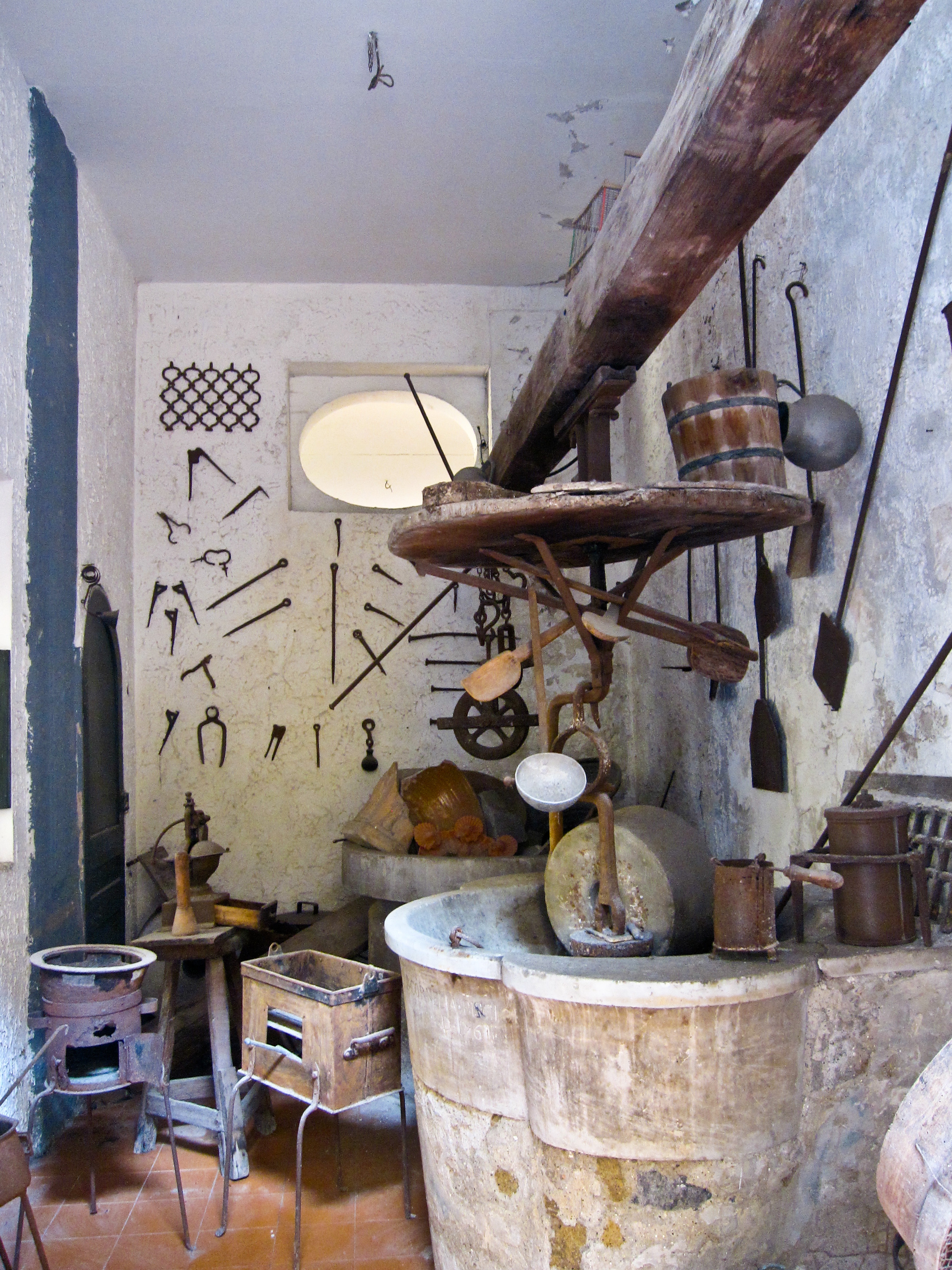 Il forno (Chiostro di San Gregorio Armeno, Napoli)